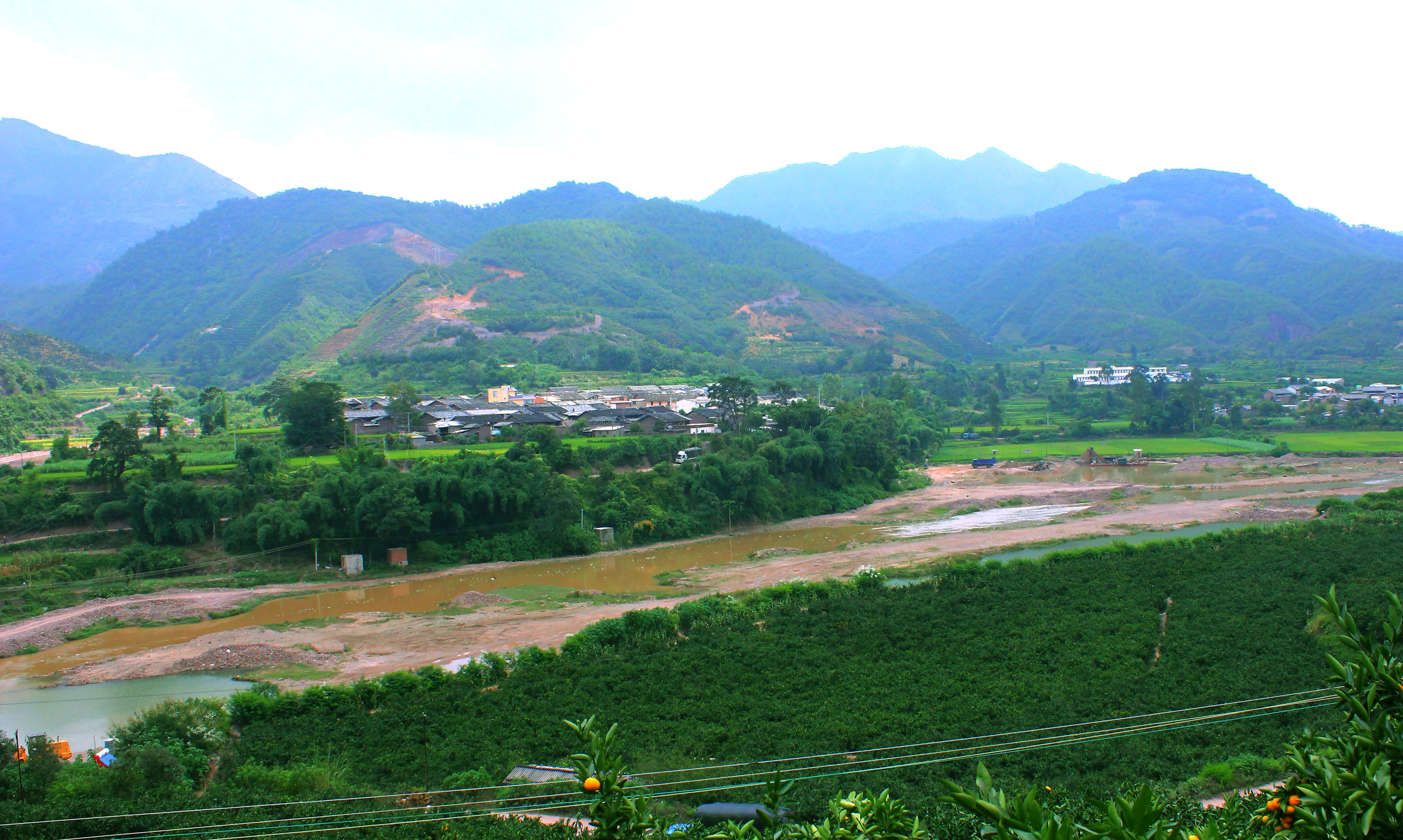 云南省华宁县华溪镇境内的华溪河（南盘江右岸直流曲江的下游部分）